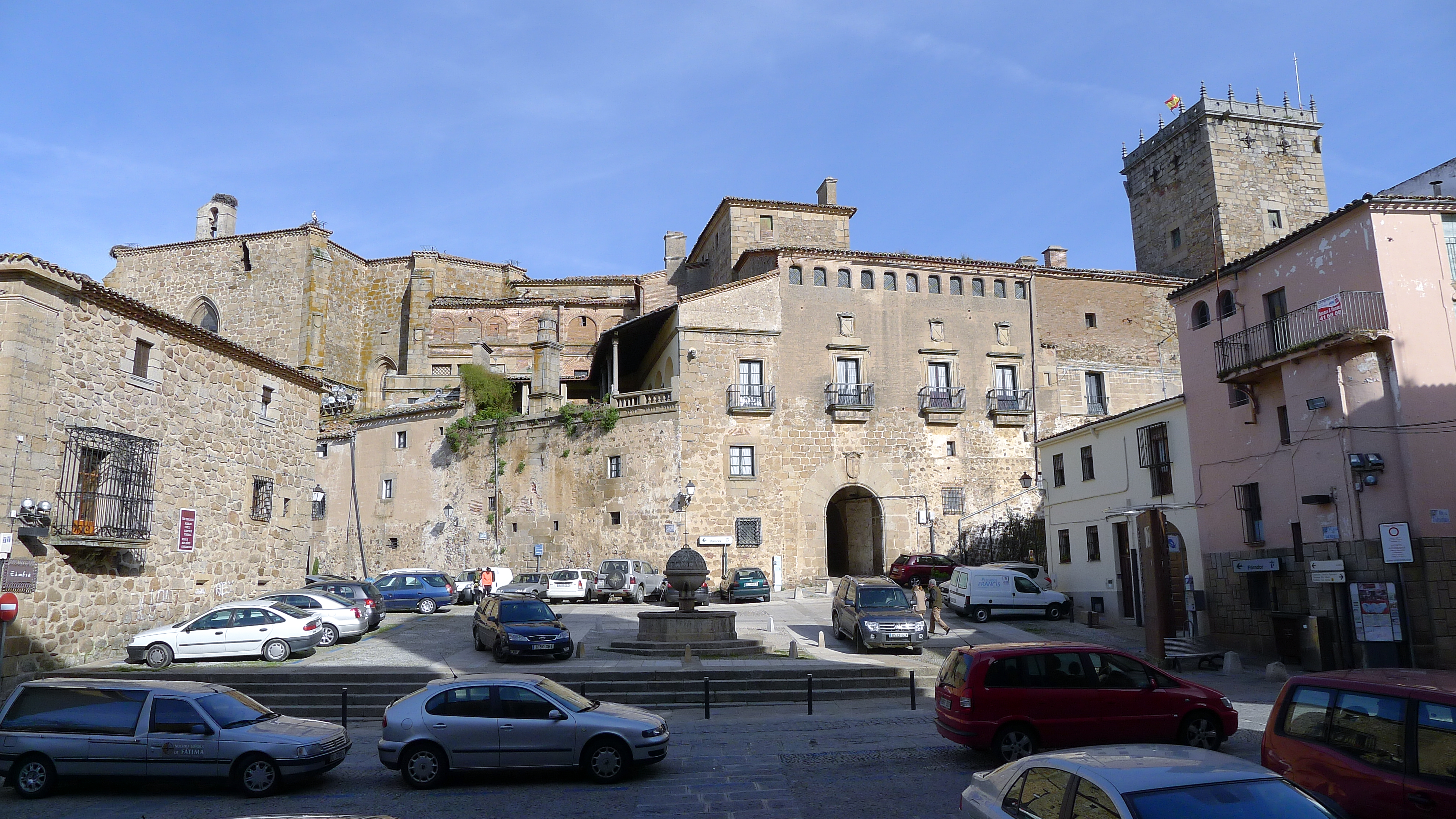 Vista de la Plaza de San Nicolás.